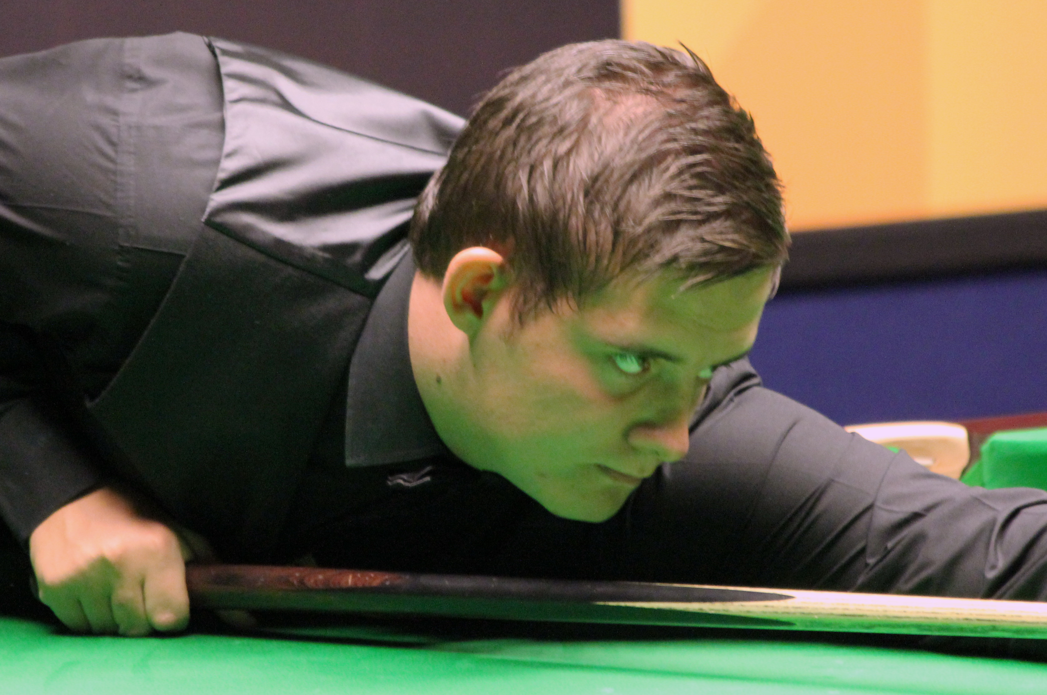 Michael Leslie beim Paul Hunter Classic 2012